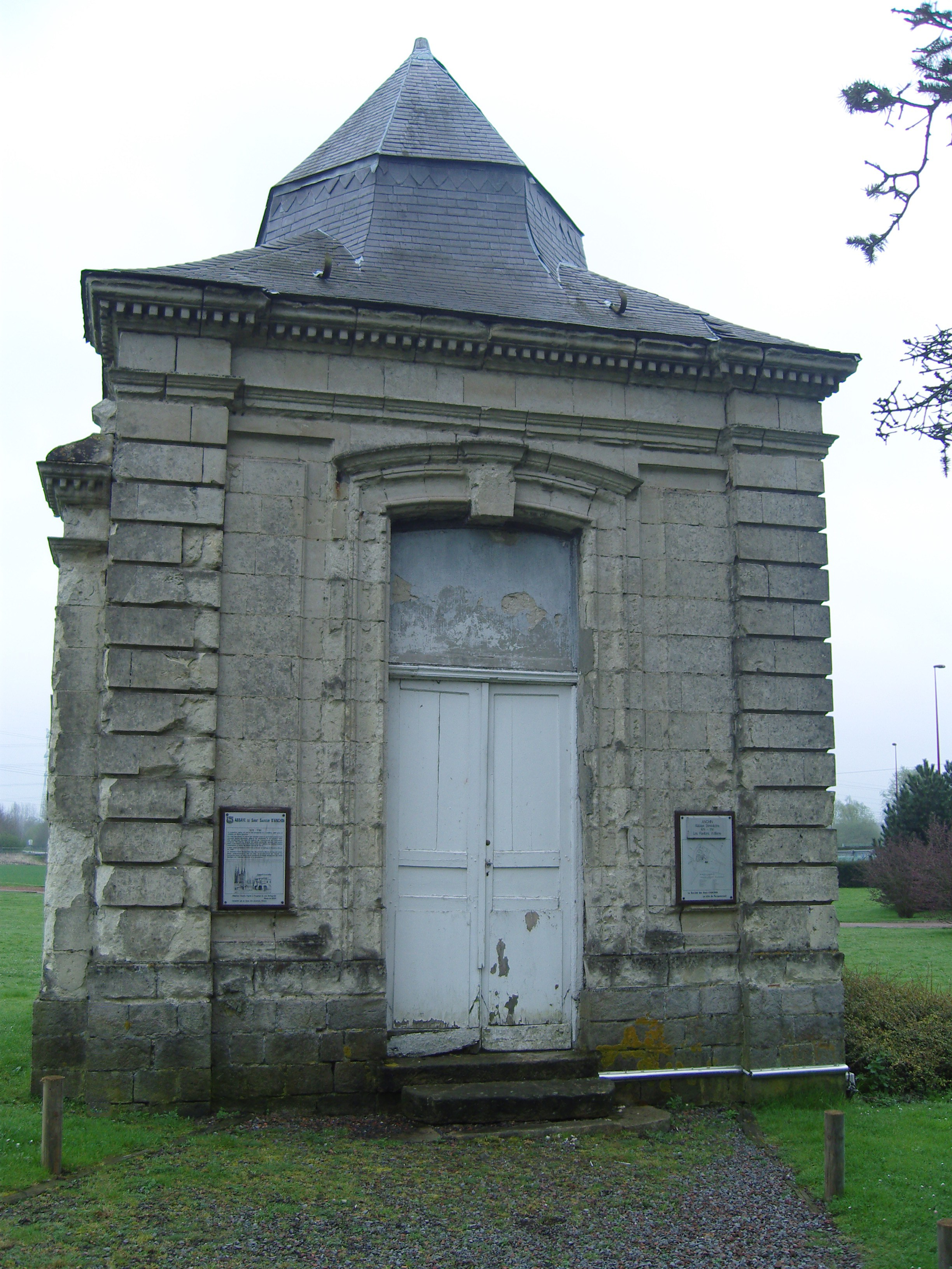 Pavillon de droite d'entrée au Collége d'anchin -pecquencourt